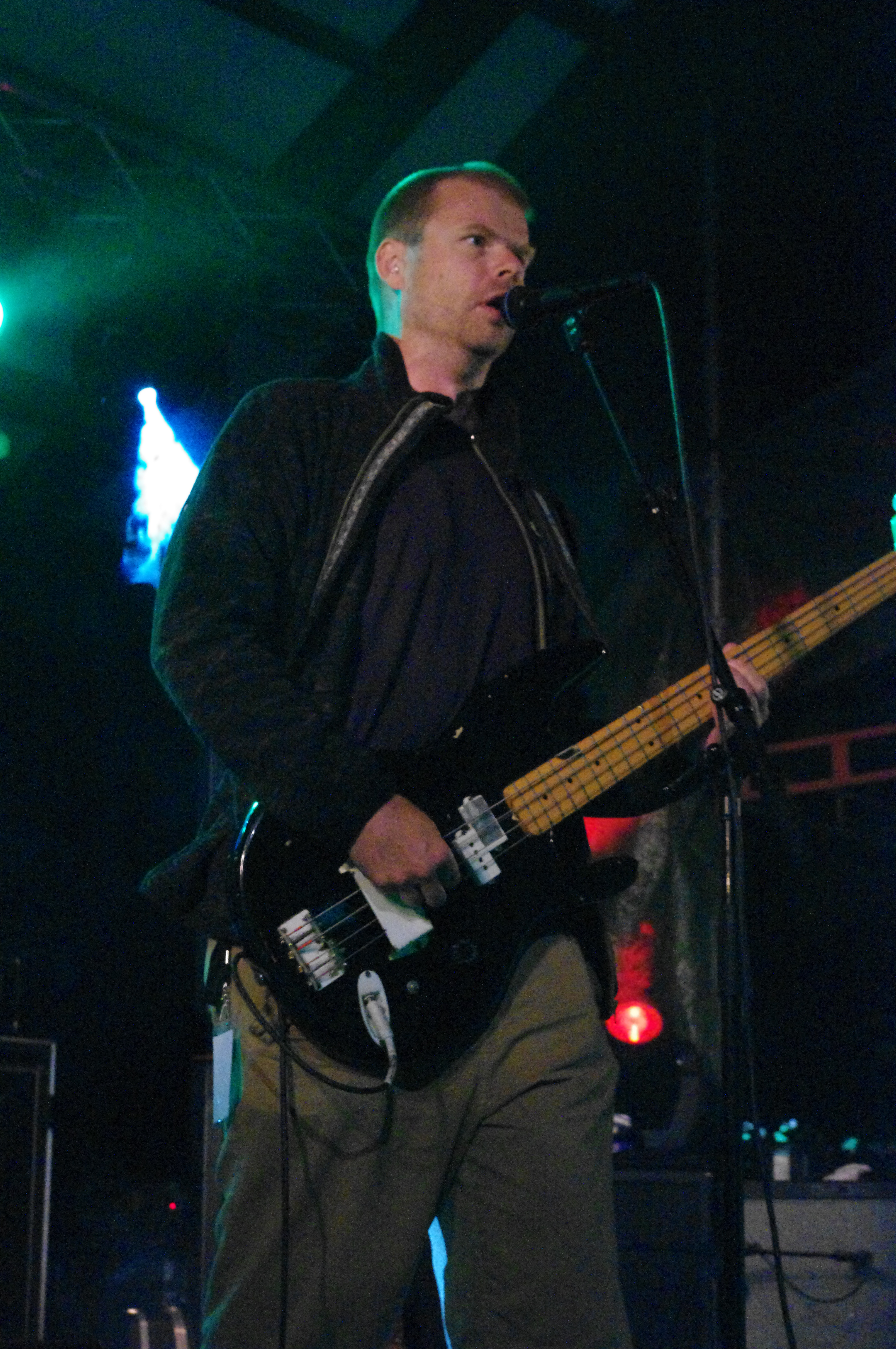 De Lyckliga Kompisarna at Pretzeltown 2011.